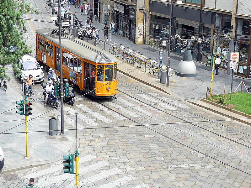 Tram di Milano serie 1500 in via Torino (Carrobbio)